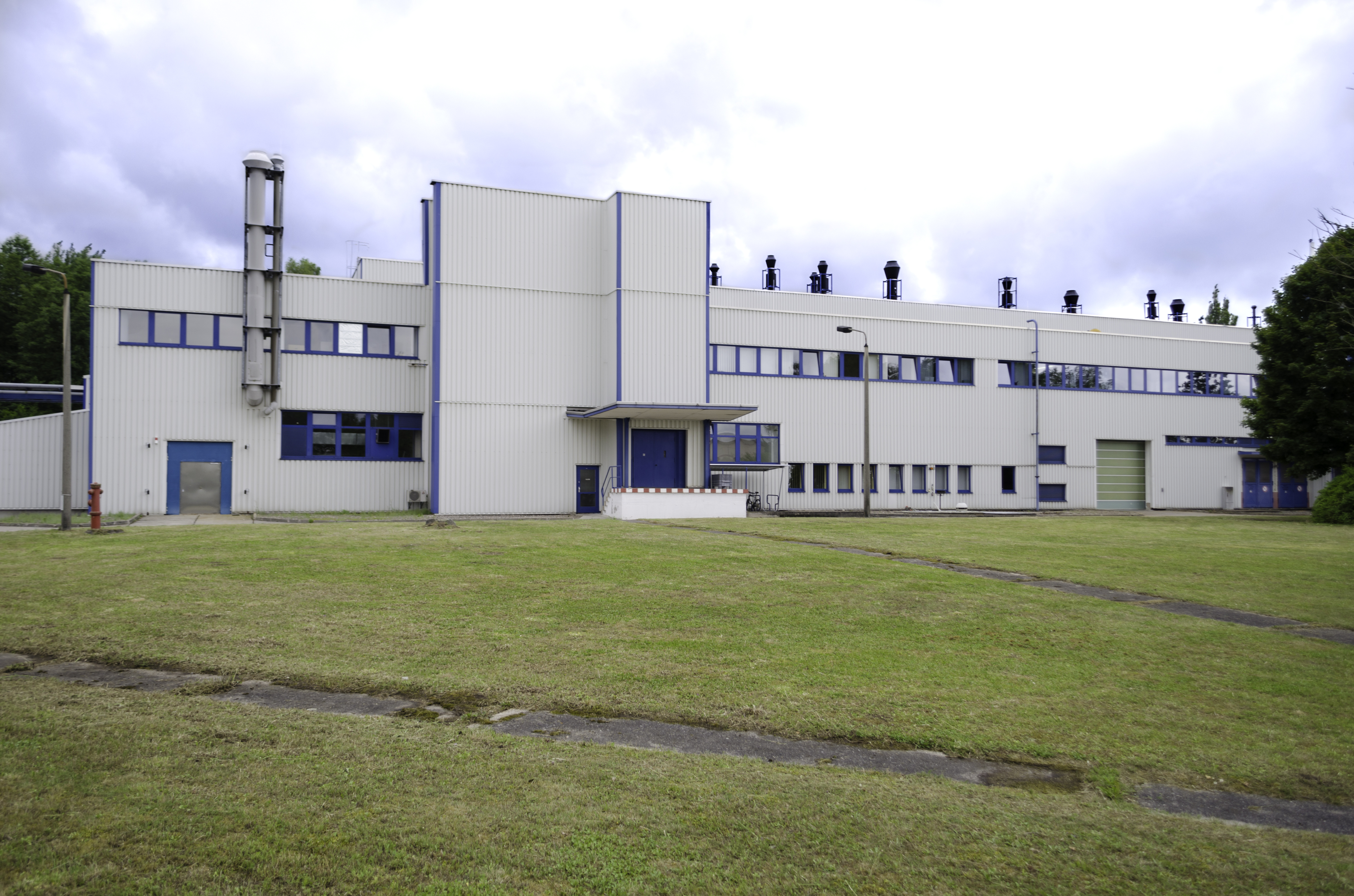 Ansicht des Firmenstandortes, Leuchtstoffwerk Breitungen